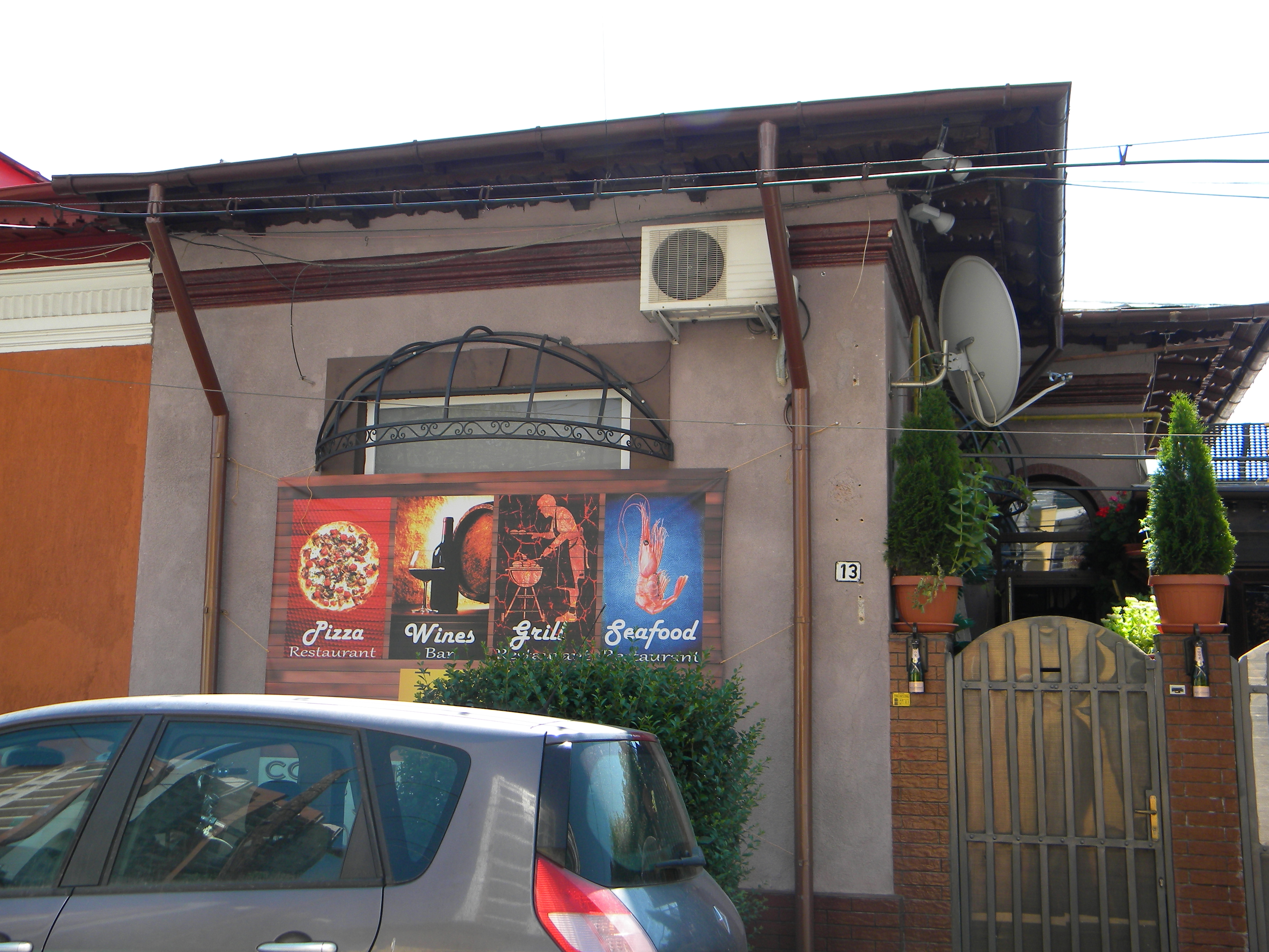 Bucuresti, Romania. Casa pe Str. Constantin Nottara nr. 13, sect. 3. B-II-m-B-19296